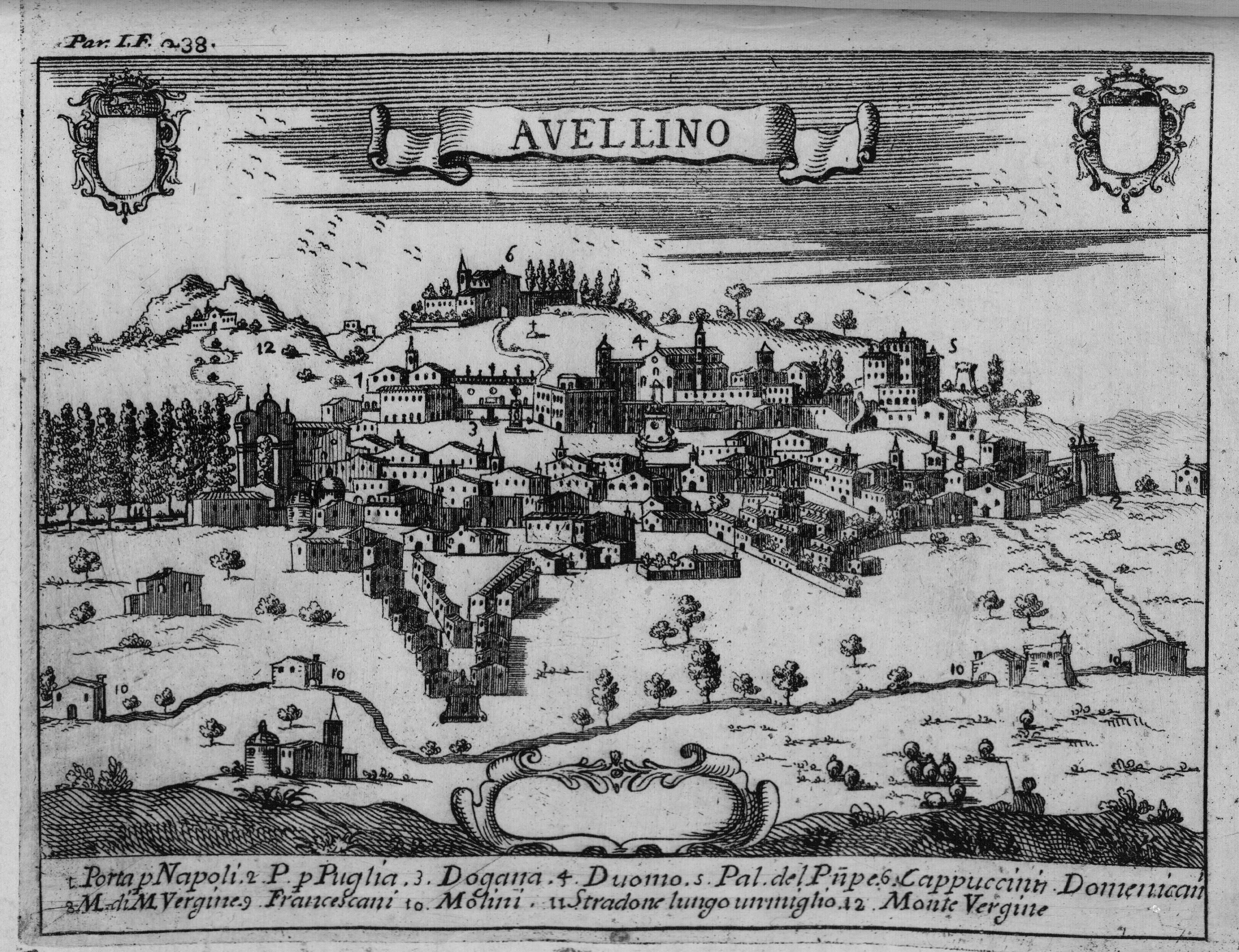 Autor: Pacichelli, Giovanni Battista, 1641-1702 Descripción bibliográfica: Il regno di Napoli in prospettiva : diviso in dodeci provincie, in cui si descrivono la sua Metropoli Fidelissima città di Napoli ... Opera postuma divisa in tre parti / dell'abatte Gio. Battista Pacichelli ; Parte prima [-terza] ... Del regno di Napoli in prospettiva / dell'abate Pacichelli. Parte prima. - In Napoli : nella Stamperia di Michele Luigi Mutio, 1703. - v. : principalmente il.; 4º . - Inic. adorn. y frisos dec. - Grab. calc. y h. pleg. grab. calc. de mapas de Cassianus de Silva. Ilustrador: Cassiano De Silva, Francesco, il. Impresor: Muzio, Michele Luigi, imp. Lugar de impresión: Italia. Nápoles Localización: Vea la ilustración en su contexto